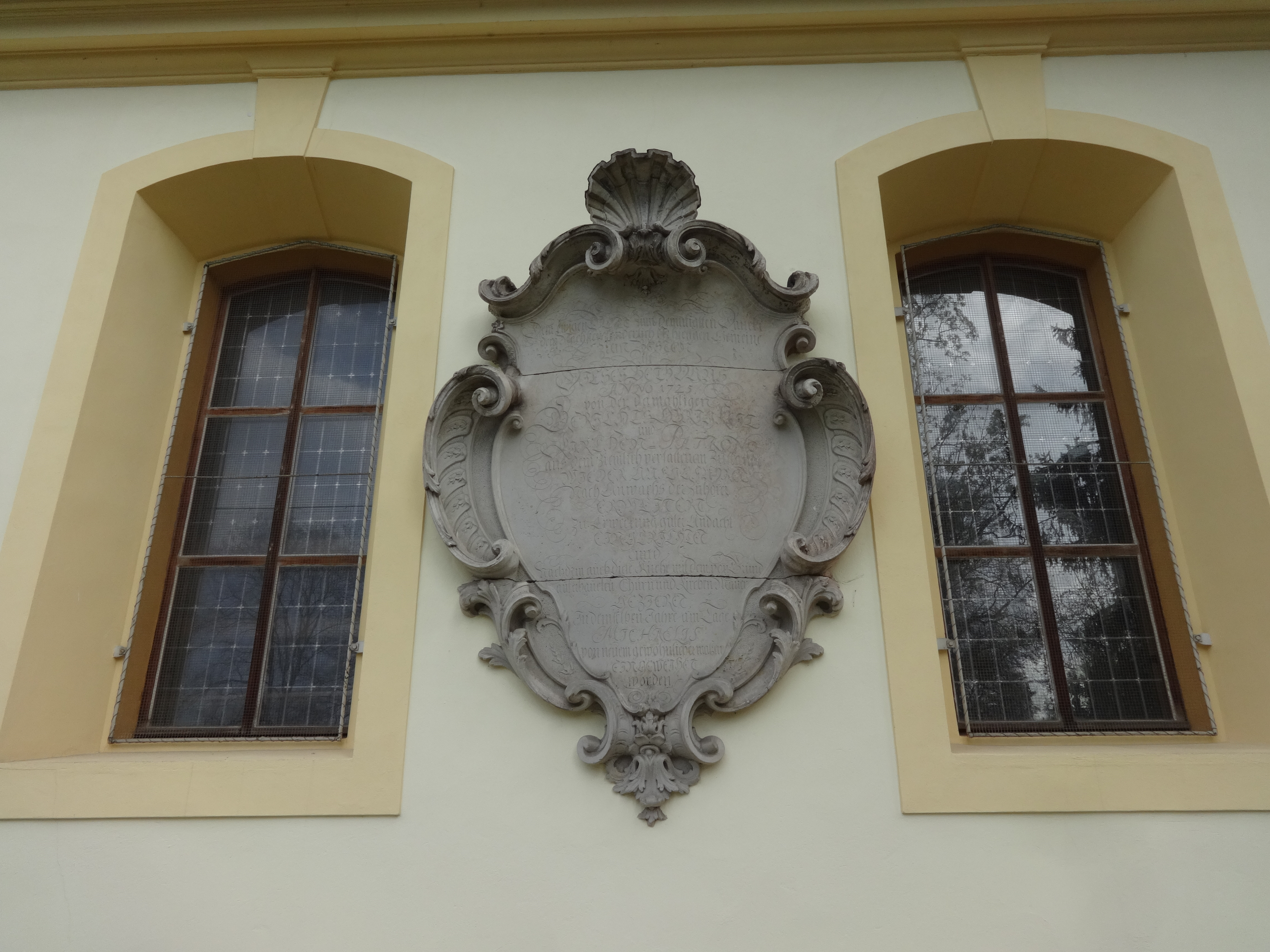 Die Schlosskirche in Schöneiche ist ein im Kern frühgotischer Feldsteinbau, der 1725 als barocker Putzbau erneuert und erweitert wurde. In seinem Innern befindet sich ein Grabmal für den Berliner Bankier Friedrich Wilhelm Schütze. Das Gebäude wird seit 1998 von der Gemeinde als Standesamt genutzt.